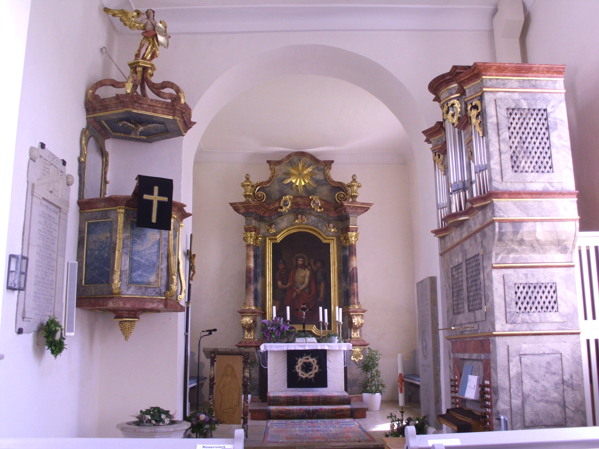 Rehlingen, Ortsteil von Langenaltheim im mittelfränkischen Landkreis Weißenburg-Gunzenhausen (Bayern), Inneres der Evang.-Luth. Pfarrkirche St. Laurentius